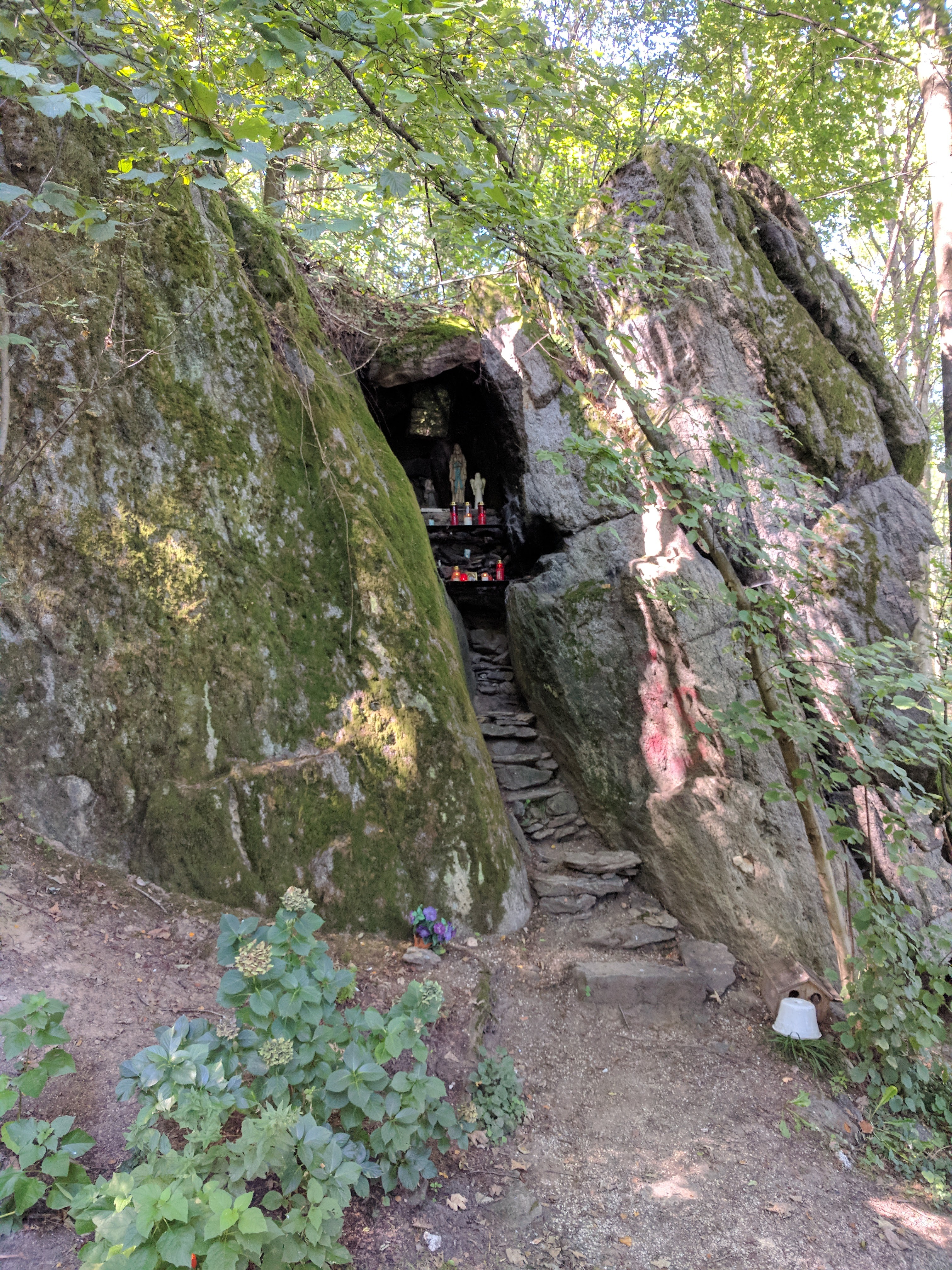 Die Pilgerstätte Heiliges Bründl in Linz